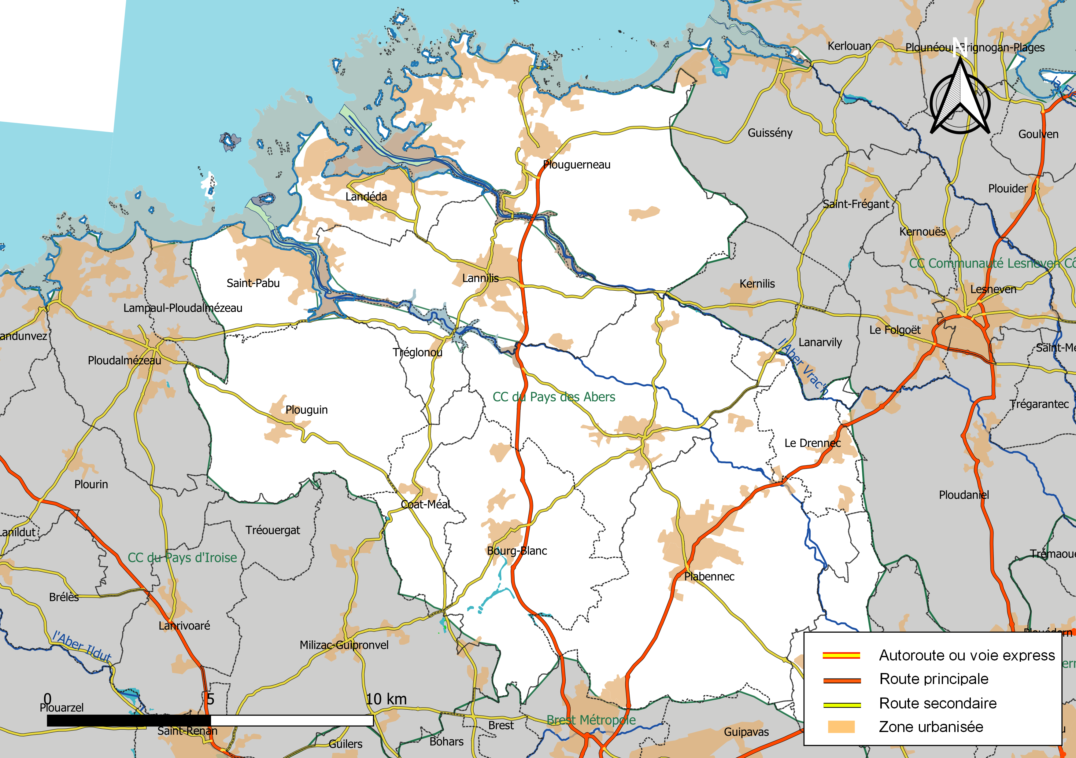 Carte géographique de la Communauté de communes du Pays des Abers, département du Finistère, France. Composition au 1er janvier 2019.